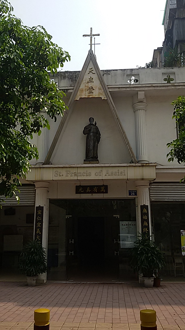 粵語: 東山聖五傷方濟各堂